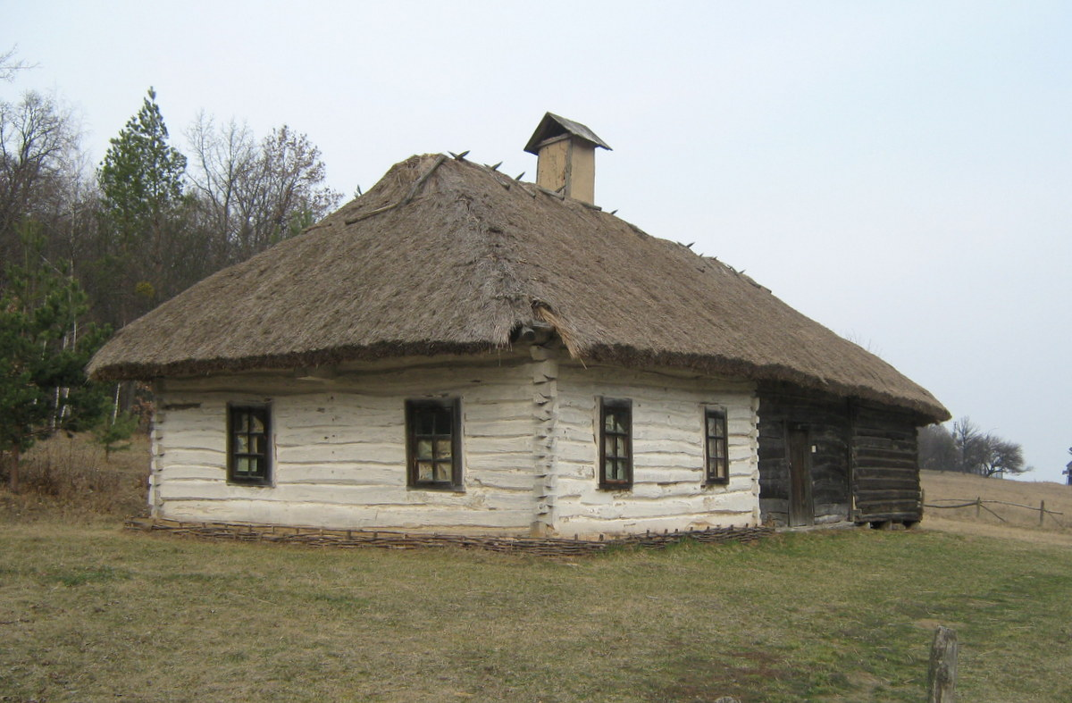 Хата з с. Бзів Баришівського р-ну Київської обл.